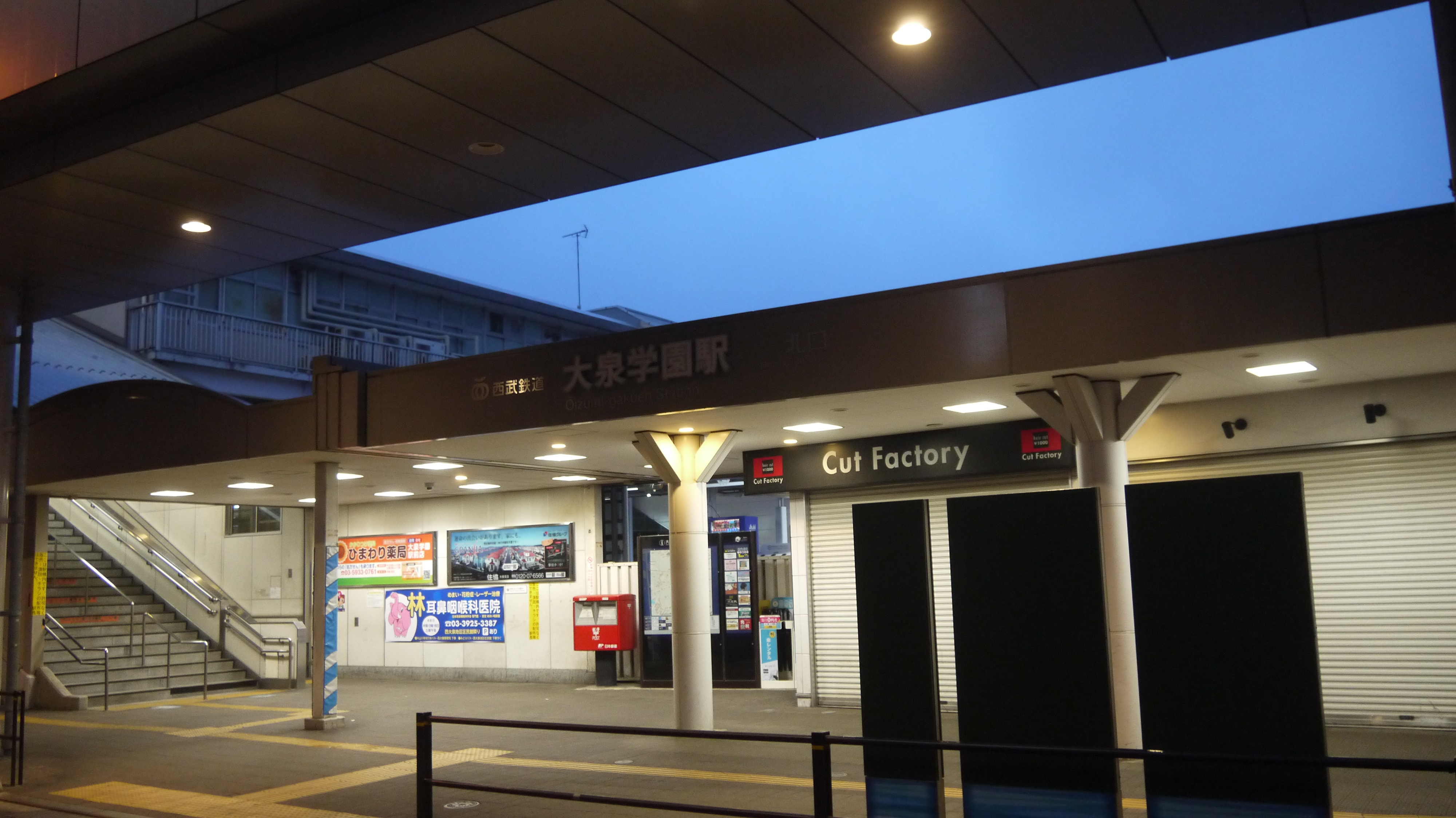 大泉学園駅北口 Panasonic Lumix DMC-GF3